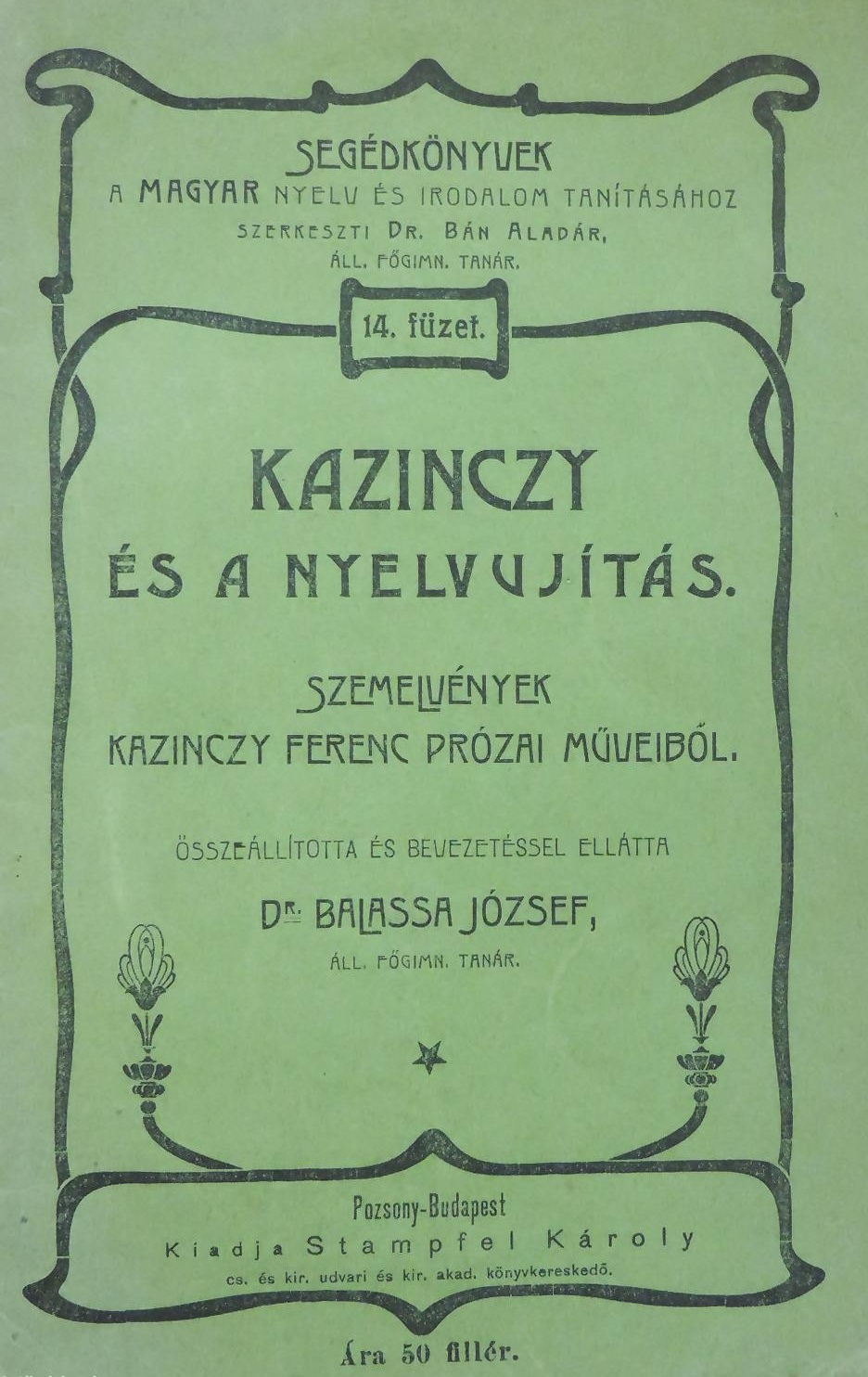 Balassa József: Kazinczy és a magyar nyelvújítás (Iskolai segédkönyvek-sorozat)